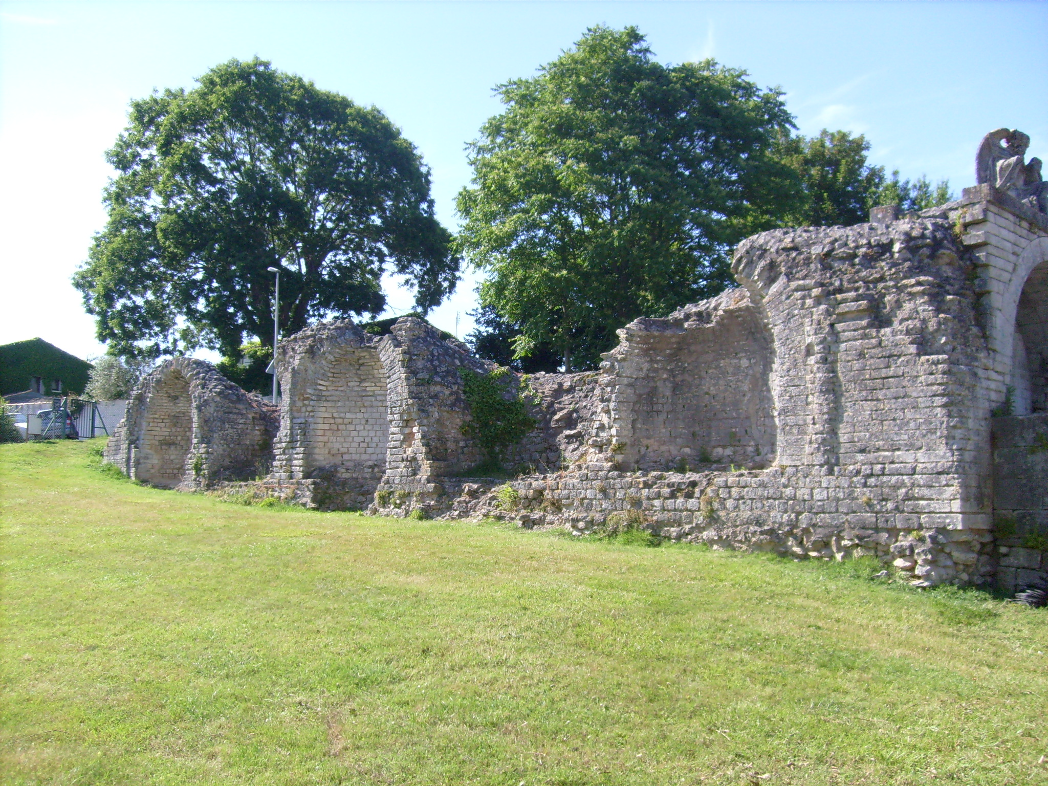 Les thermes Saint-Saloine à Saintes